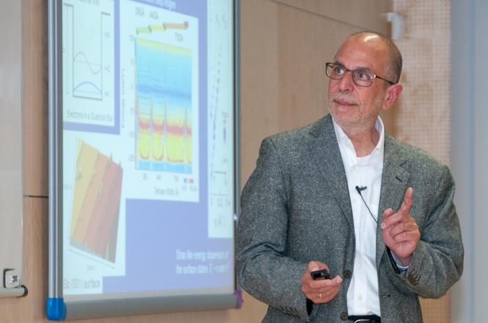 Robert Cava, doctor honoris causa Politechniki Gdańskiej